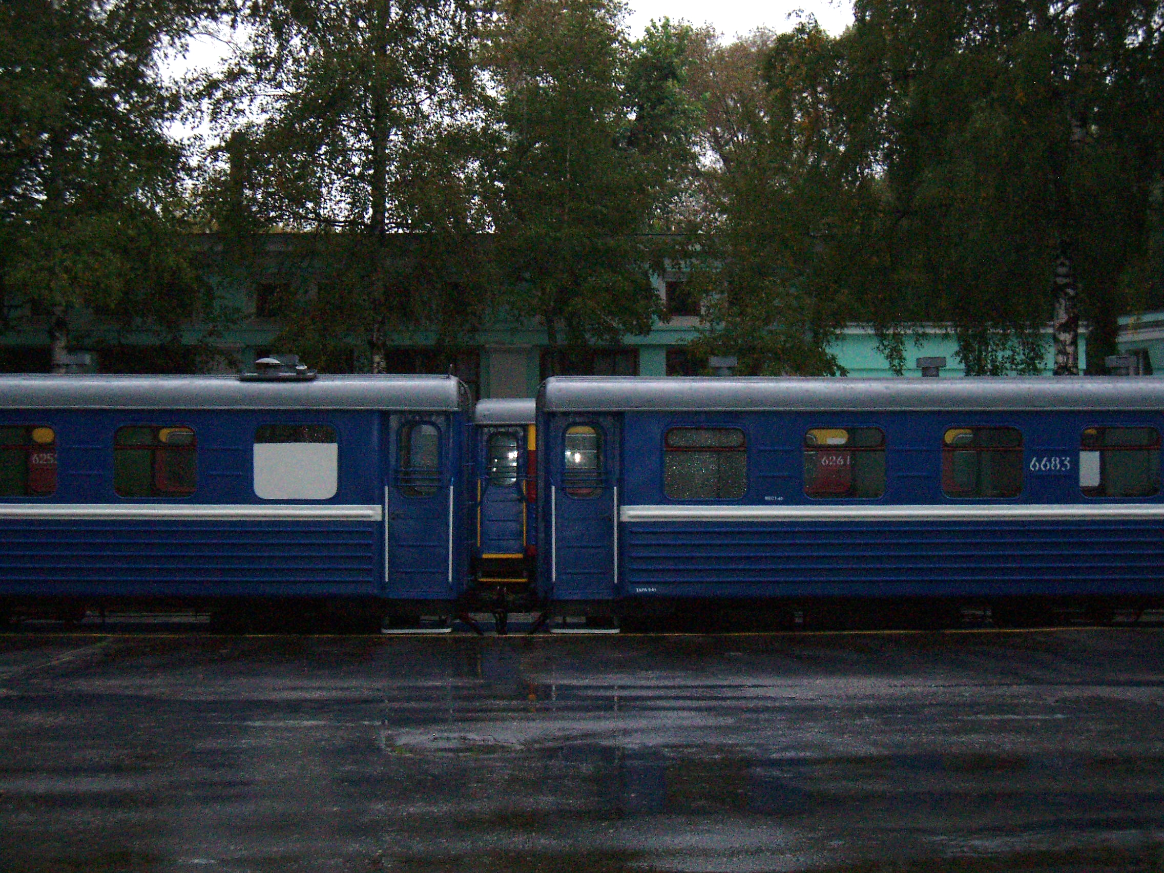 Узкоколейные пассажирские вагоны ГДЖД